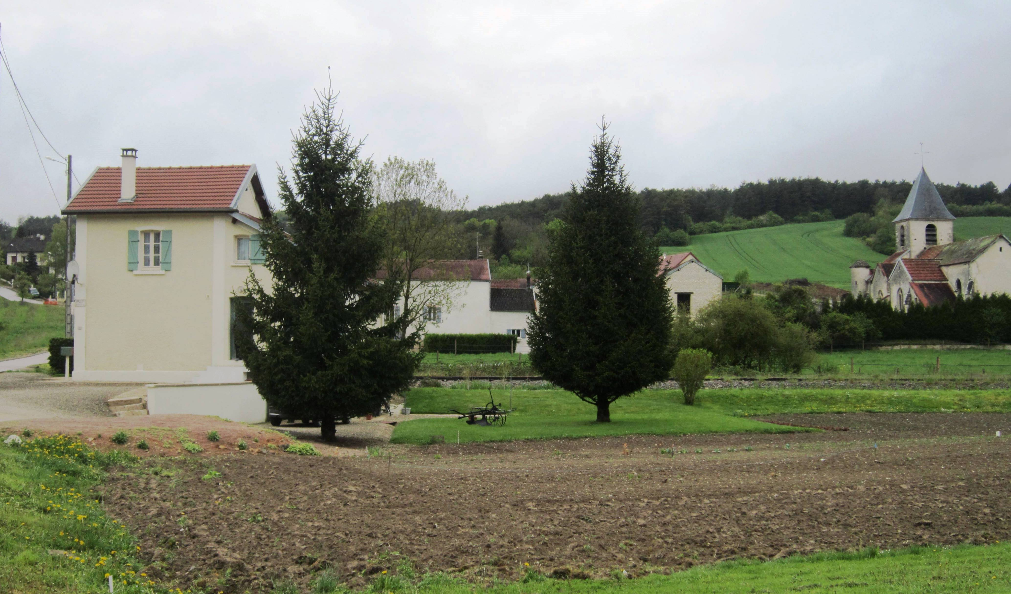 Gomméville (Côte-d'Or) : le haut du village